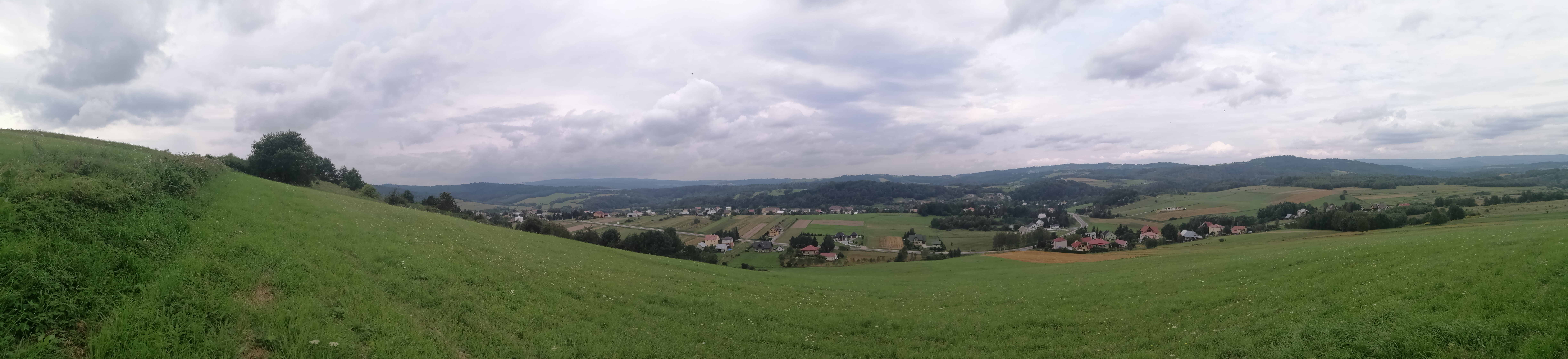 Widok na Czaszyn